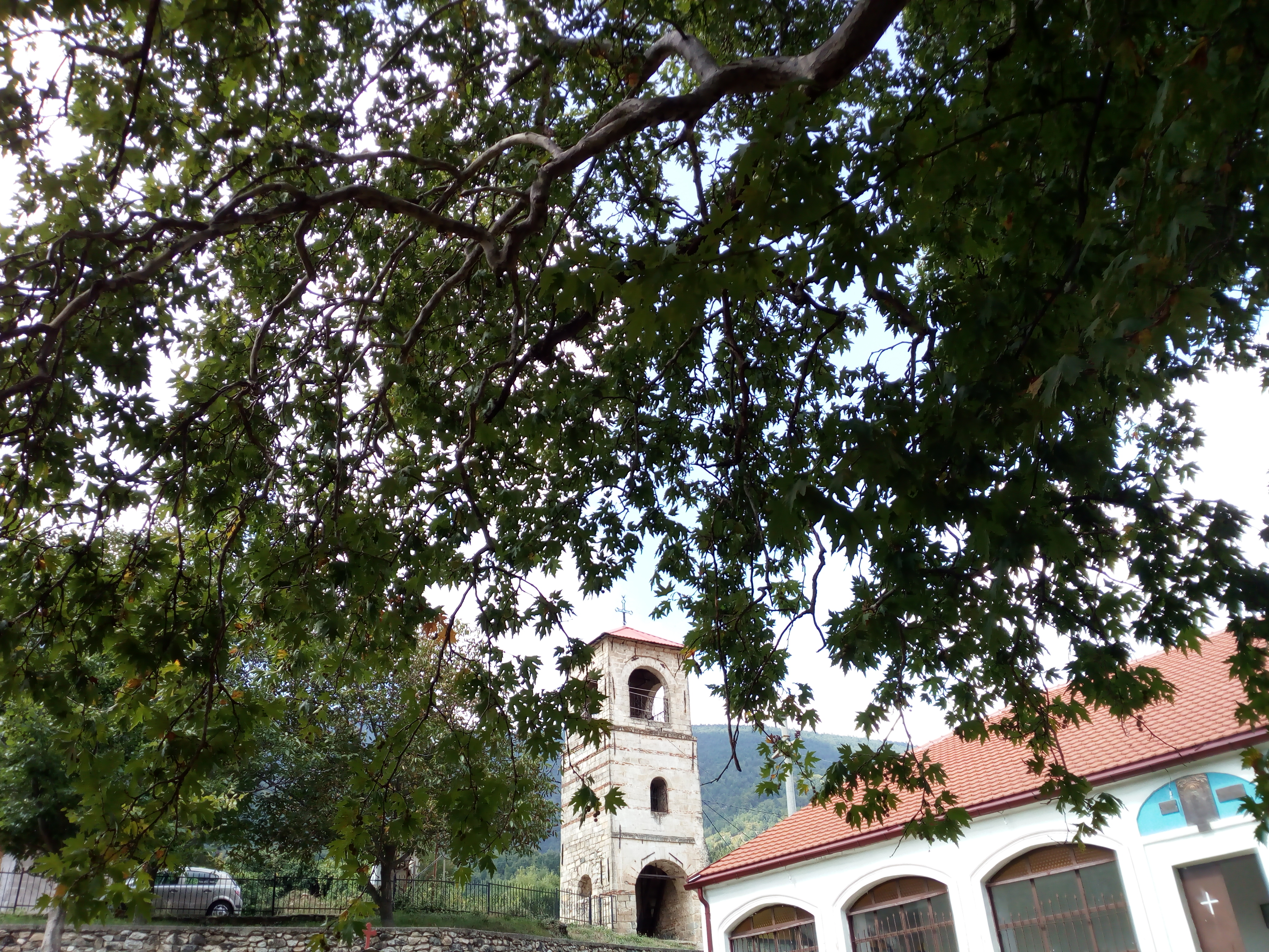 Камбанаријата на црквата Св. Петка во селото Нижеполе